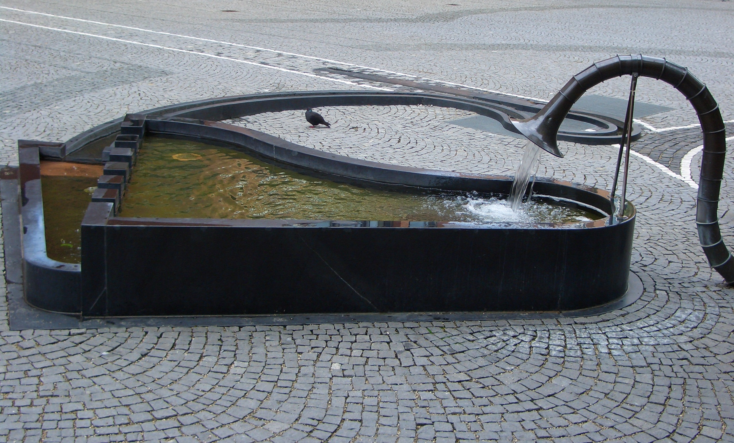 Erich-Schulze-Brunnen vor dem GEMA-Gebäude in München, Auslaufbecken